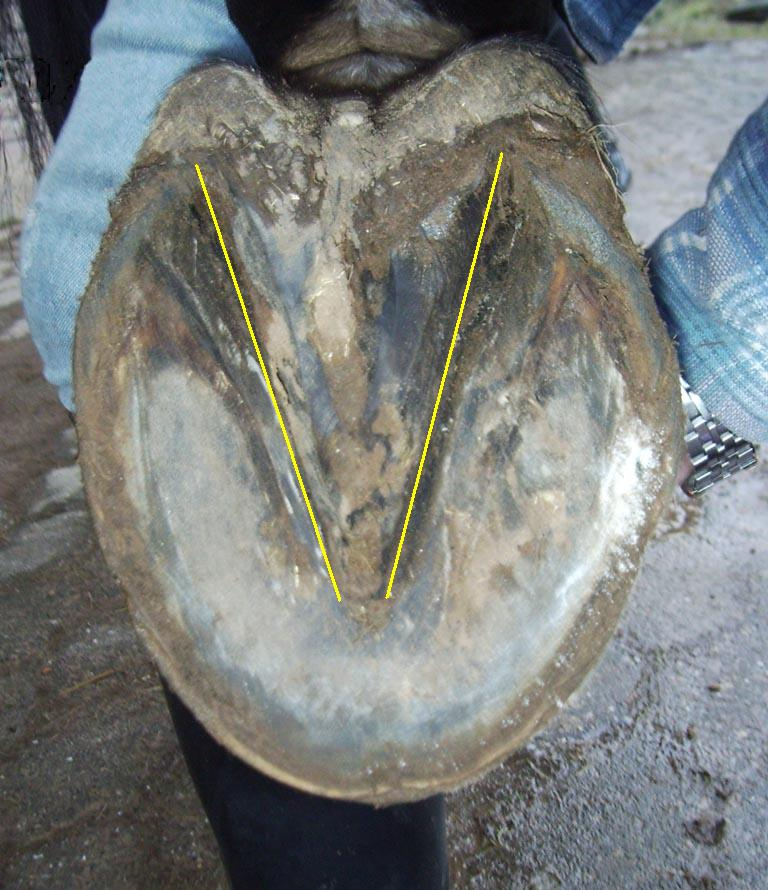 Hufstrahl, gesunde V-Form